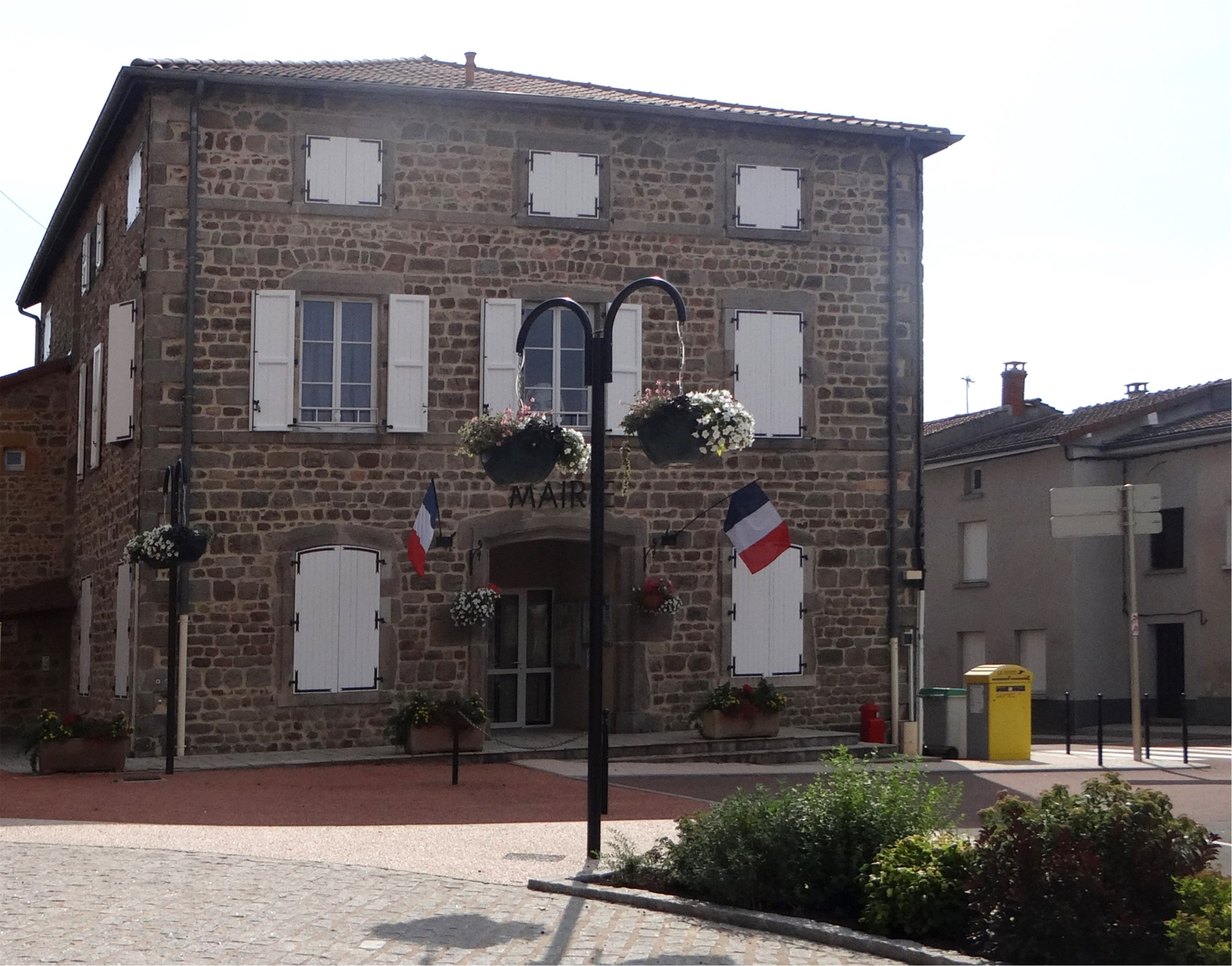 Mairie de Saint-Martin-Lestra, Loire, France.